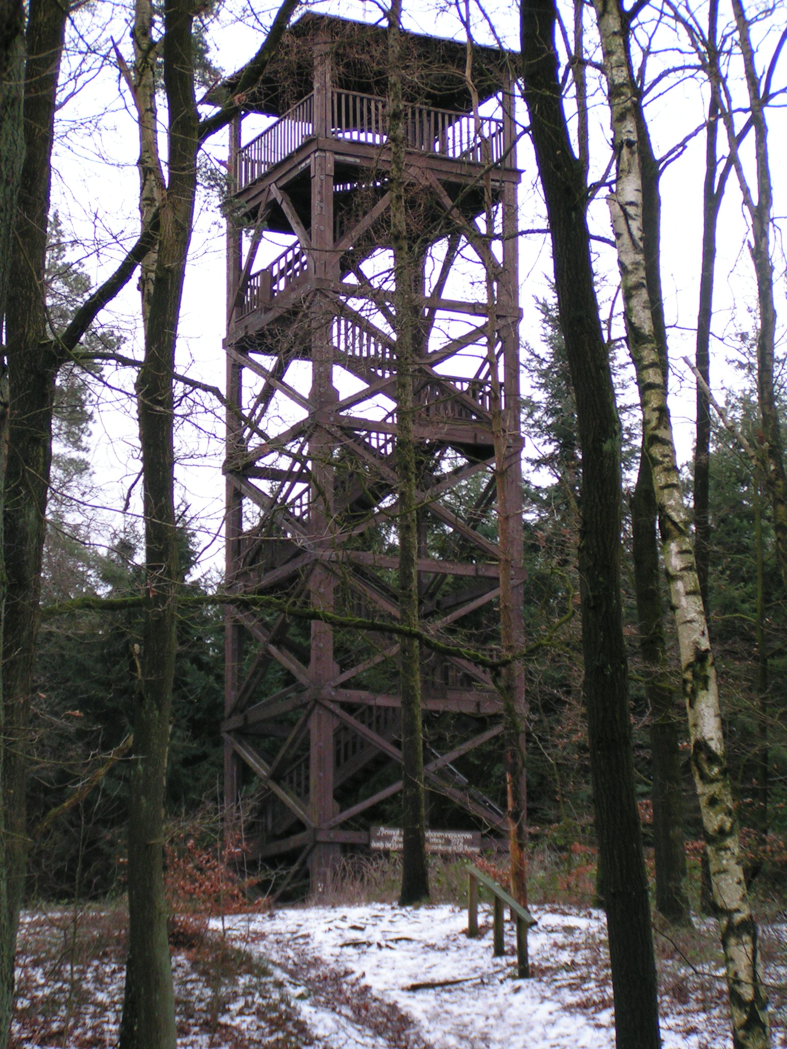 Wahlde (Gemeinde Neuenkirchen-Vörden): Aussichtsturm in den Dammer Bergen